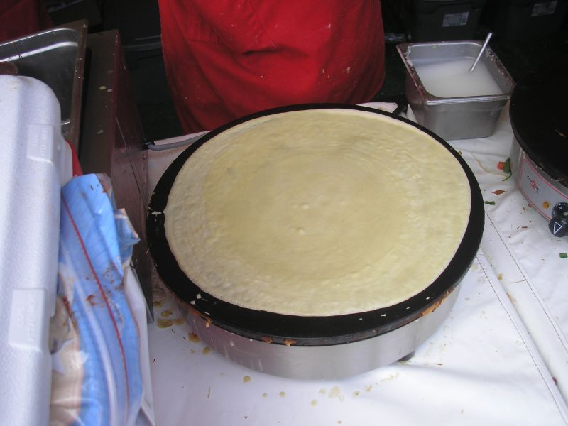 Crêpe à la cuisson